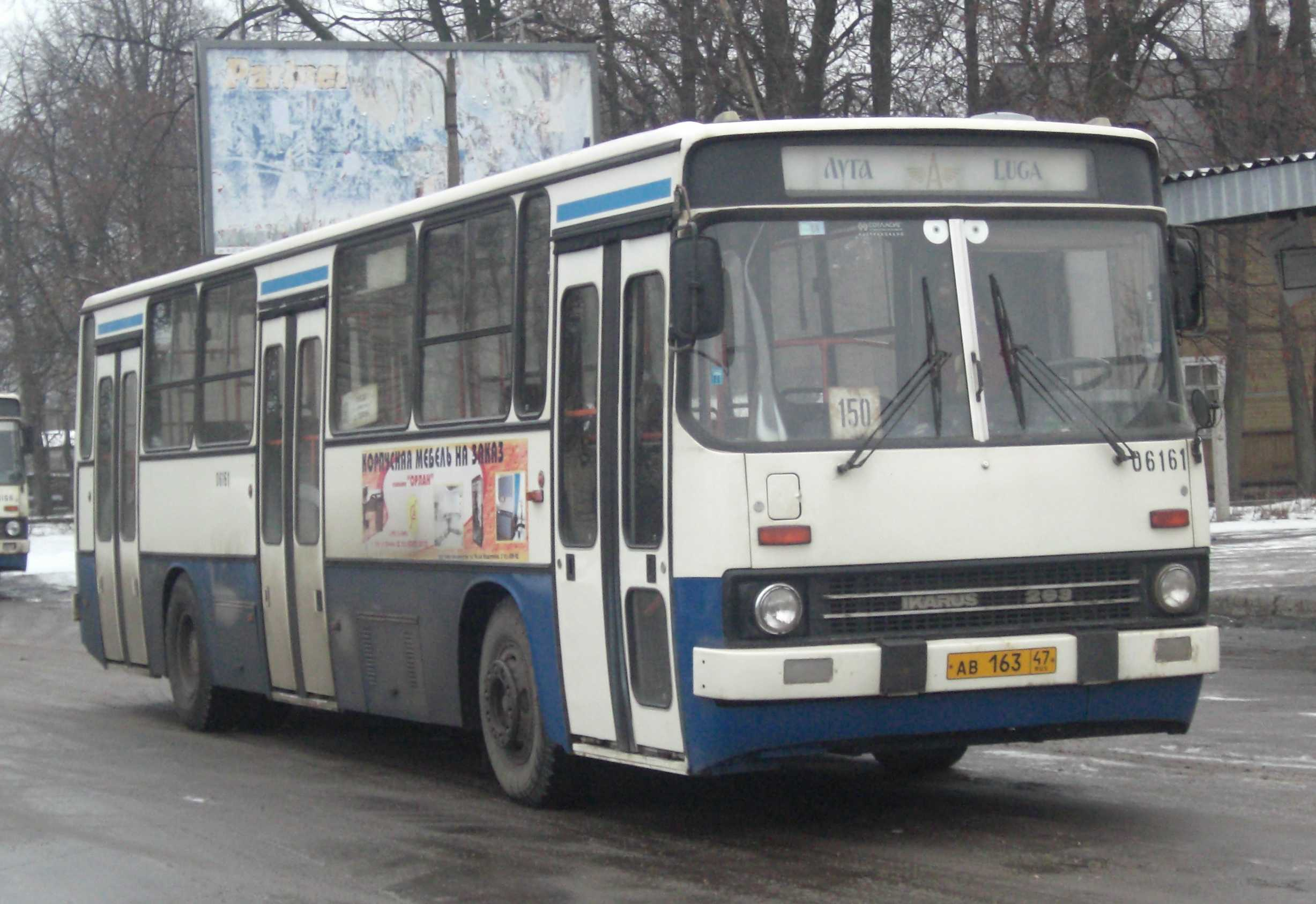 Автобус Ikarus-263.10 Лужского МУ ПАП в Луге - Bus Ikarus-263.10 Luga's MU PAP, Luga